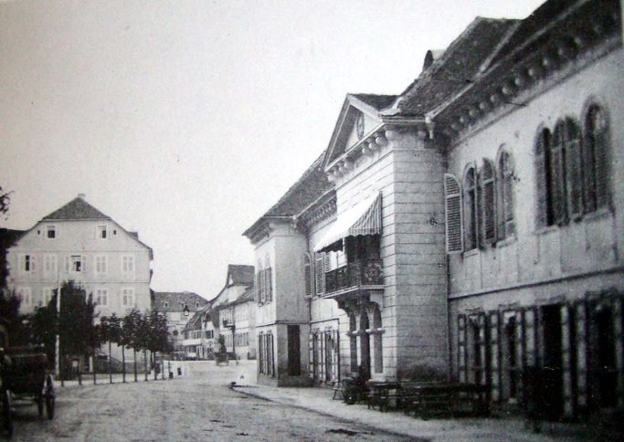 Königliches Kurhaushotel in Bad Kissingen um 1870; Foto: Wilhelm Cronenberg